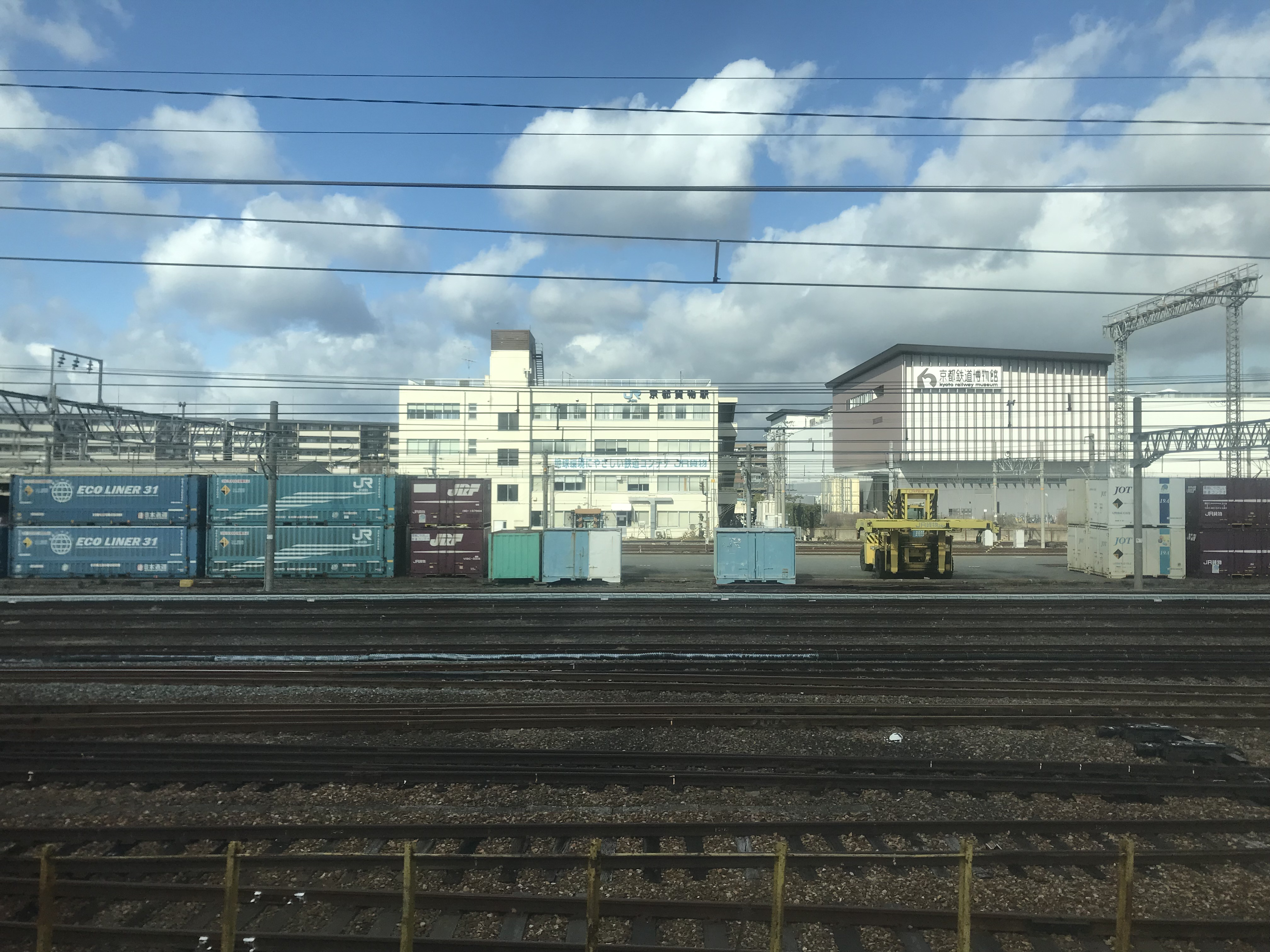 JR京都線の列車内より望む京都貨物駅と京都鉄道博物館